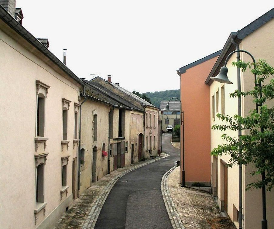 Une rue de Waldbredimus (Luxembourg)